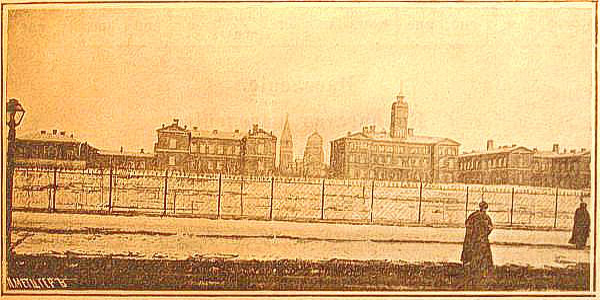 Ростов-на-Дону до Октябрьской революции. Николаевская городская больница (панорама).